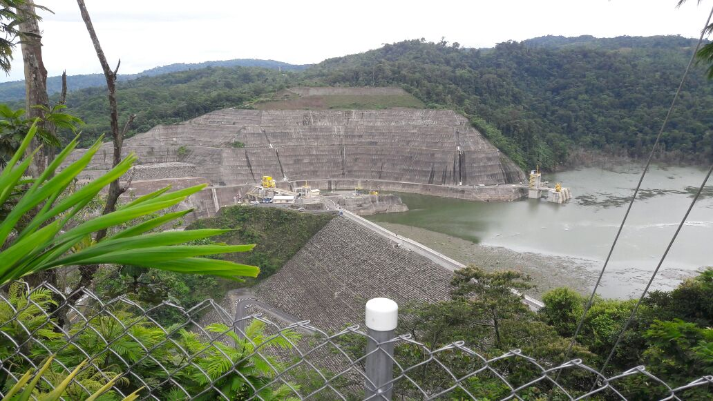 La represa hidroeléctrica Reventazón, construida por el Instituto Costarricense de Electricidad, es la más grande de Centroamérica y la segunda obra de infraestructura más grande del istmo luego del Canal de Panamá.